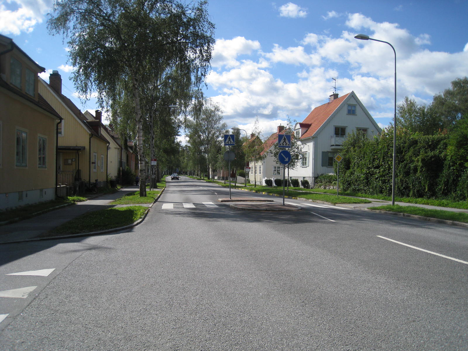 Smedslättens lekskola, Gula Villan, Alviksvägen 143, Smedslätten, Bromma.